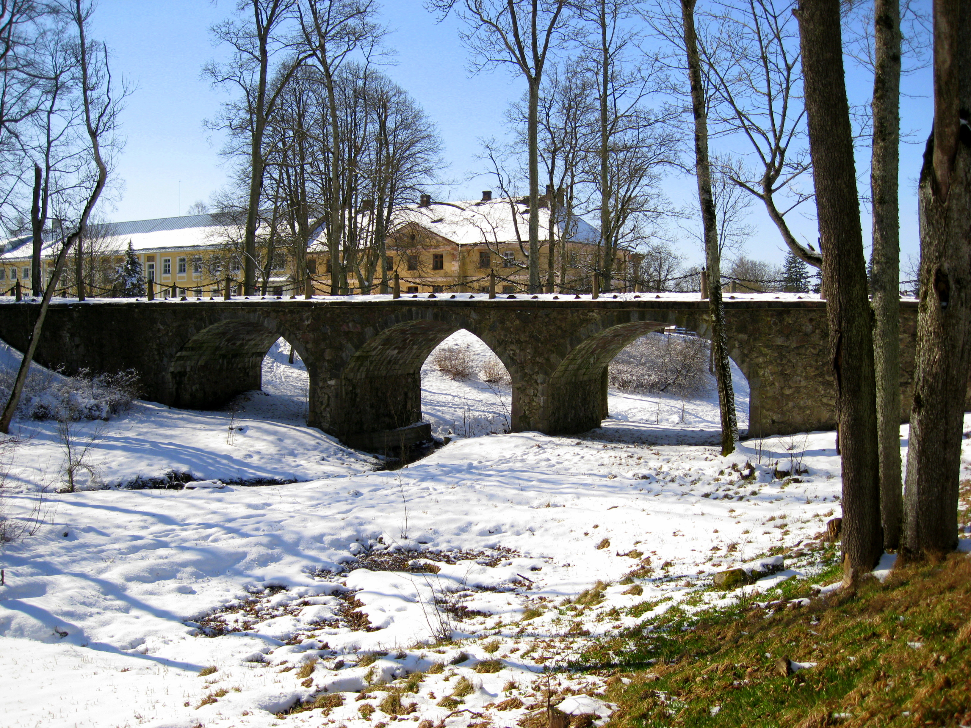 Akmens tilts Kazdangā